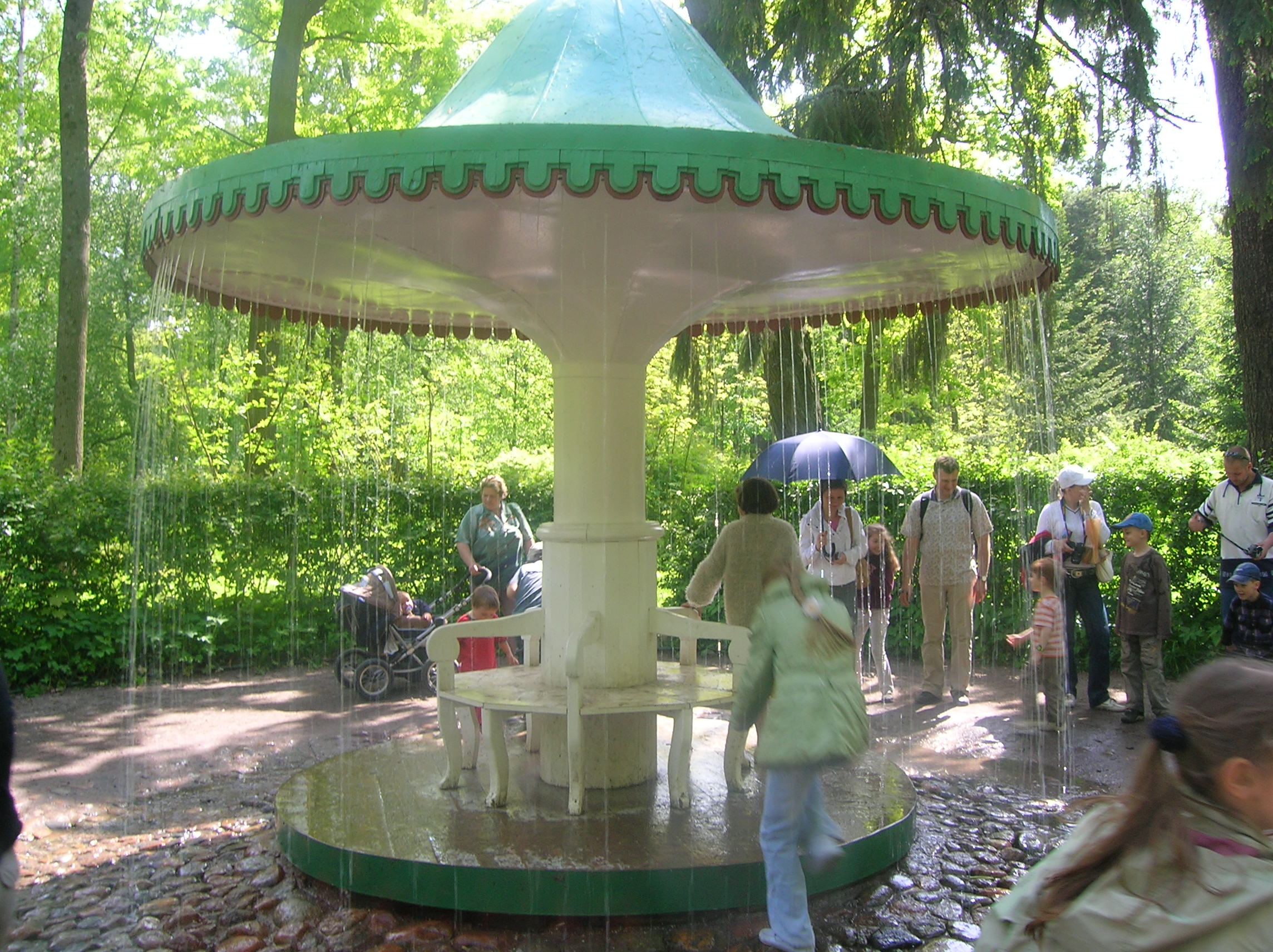 Фонтан-шутиха «Зонтик»